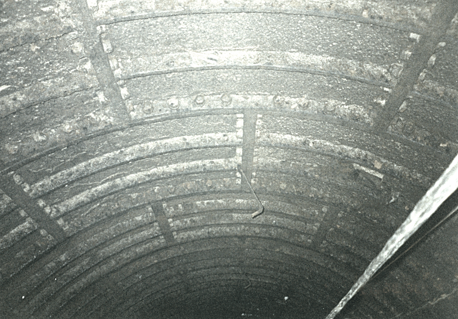 Zustand der Tübbingsäule des Schachtes Conow nach dem teilweisen Sümpfen des Schachtes (Teufenabschnitt etwa 35 - 45 m).